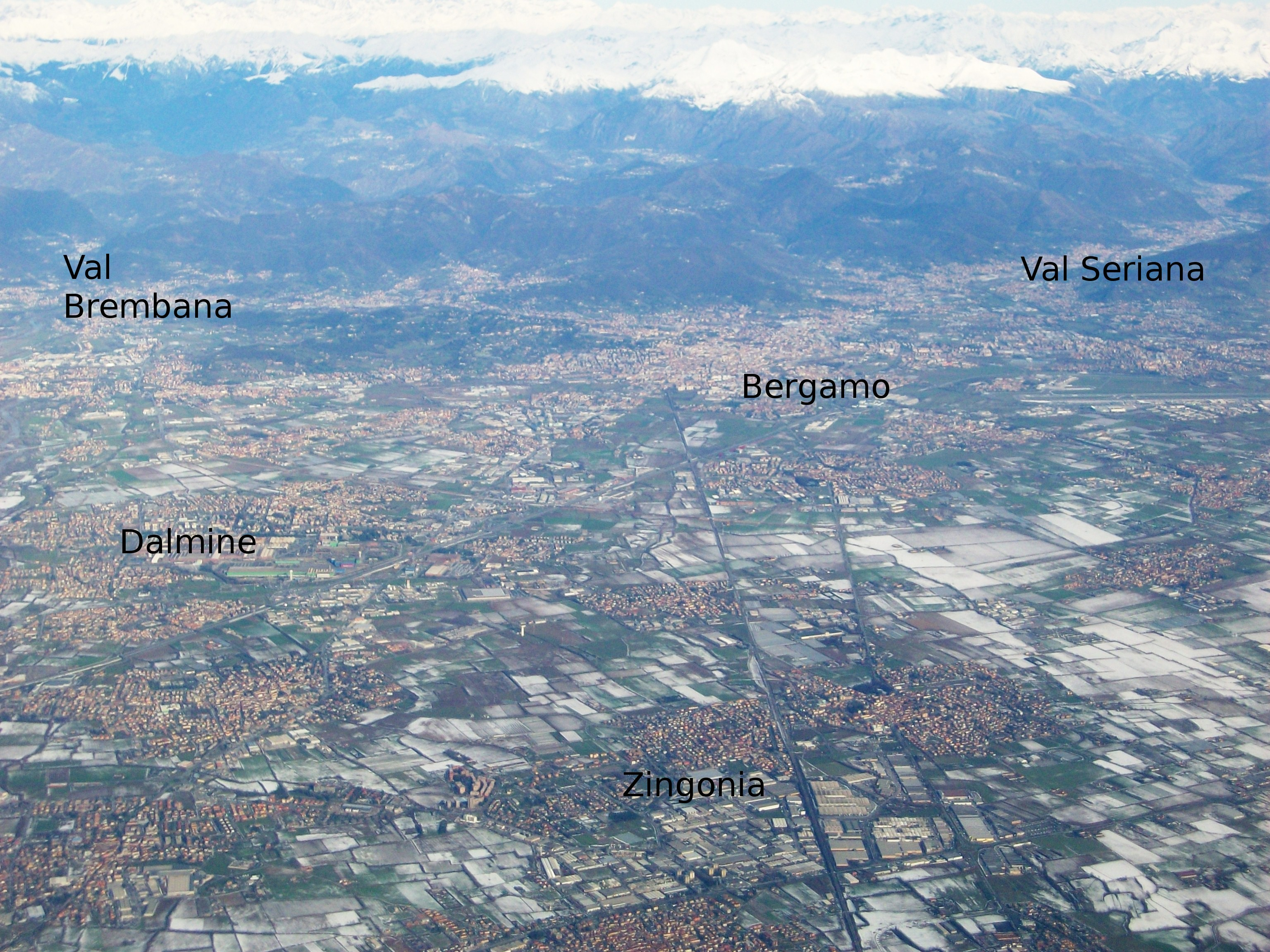 Visuale area dell'Alta Bergamasca, con indicazione delle principali aree urbane